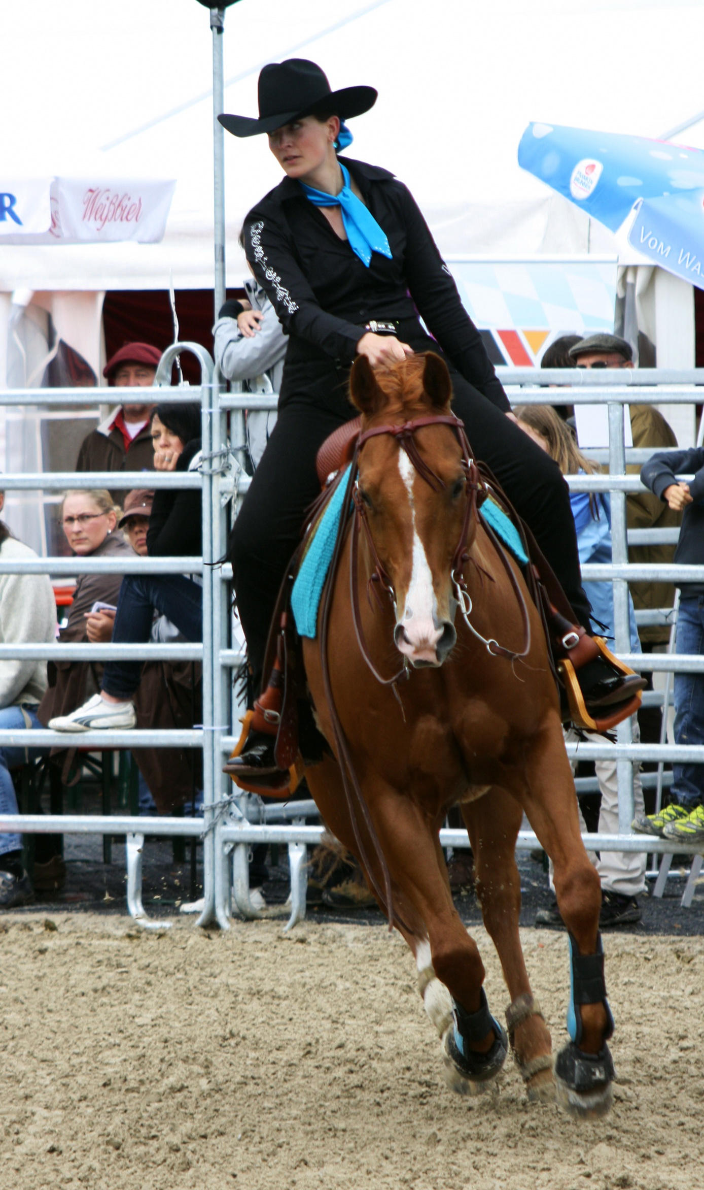 Westernreiten auf der Veranstaltung Pferd International.